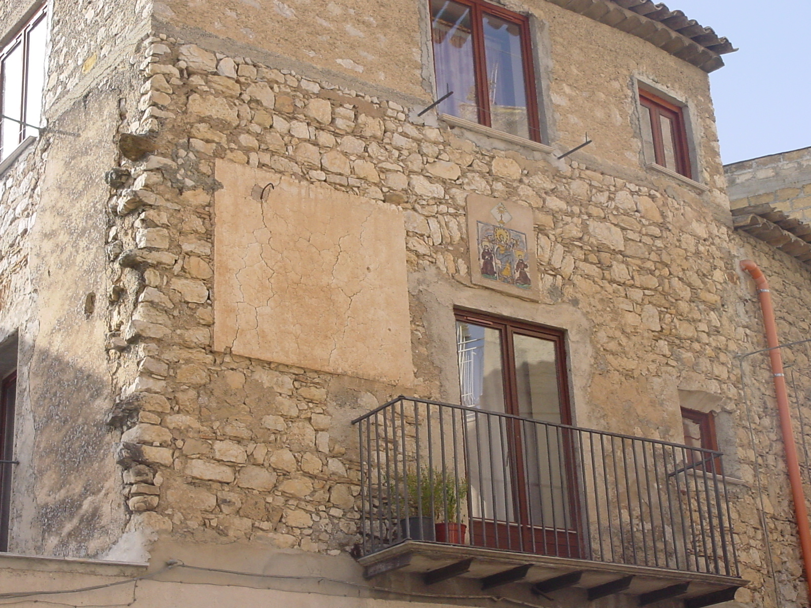 Orologio Solare in via Fondachello